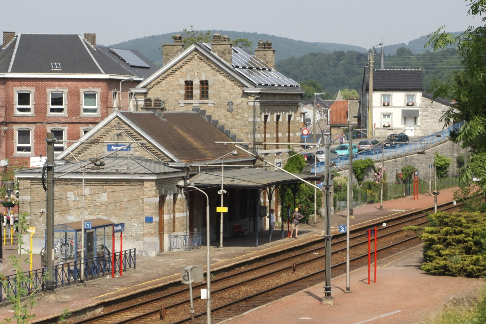 Gare vun Aywaille.